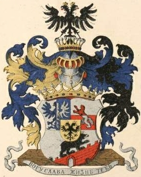 Bobrinski suguvõsa krahvivapp